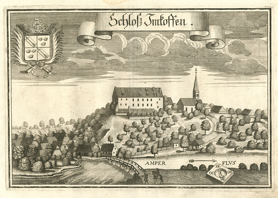 “Schloß Imkoffen” (Haag a. d. Amper, Inkofen); aus : Beschreibung des Churfürsten- u. Hertzogthumbs Ober- und Nidern Bayrn. Rentamt Landshut., 1723